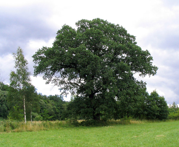 Památný strom Dub na rozcestí u Březiny.